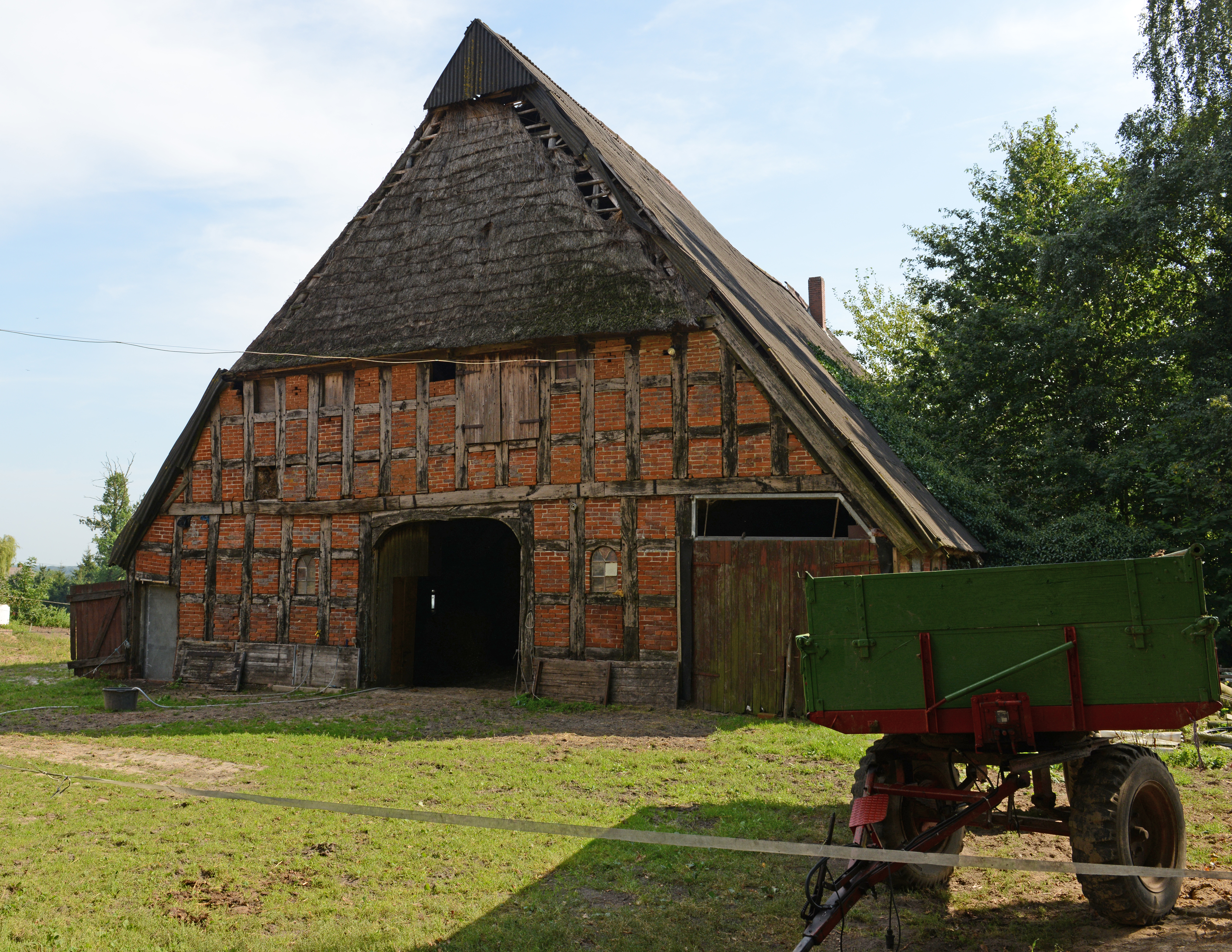 Baudenkmal in Syke Osterholz